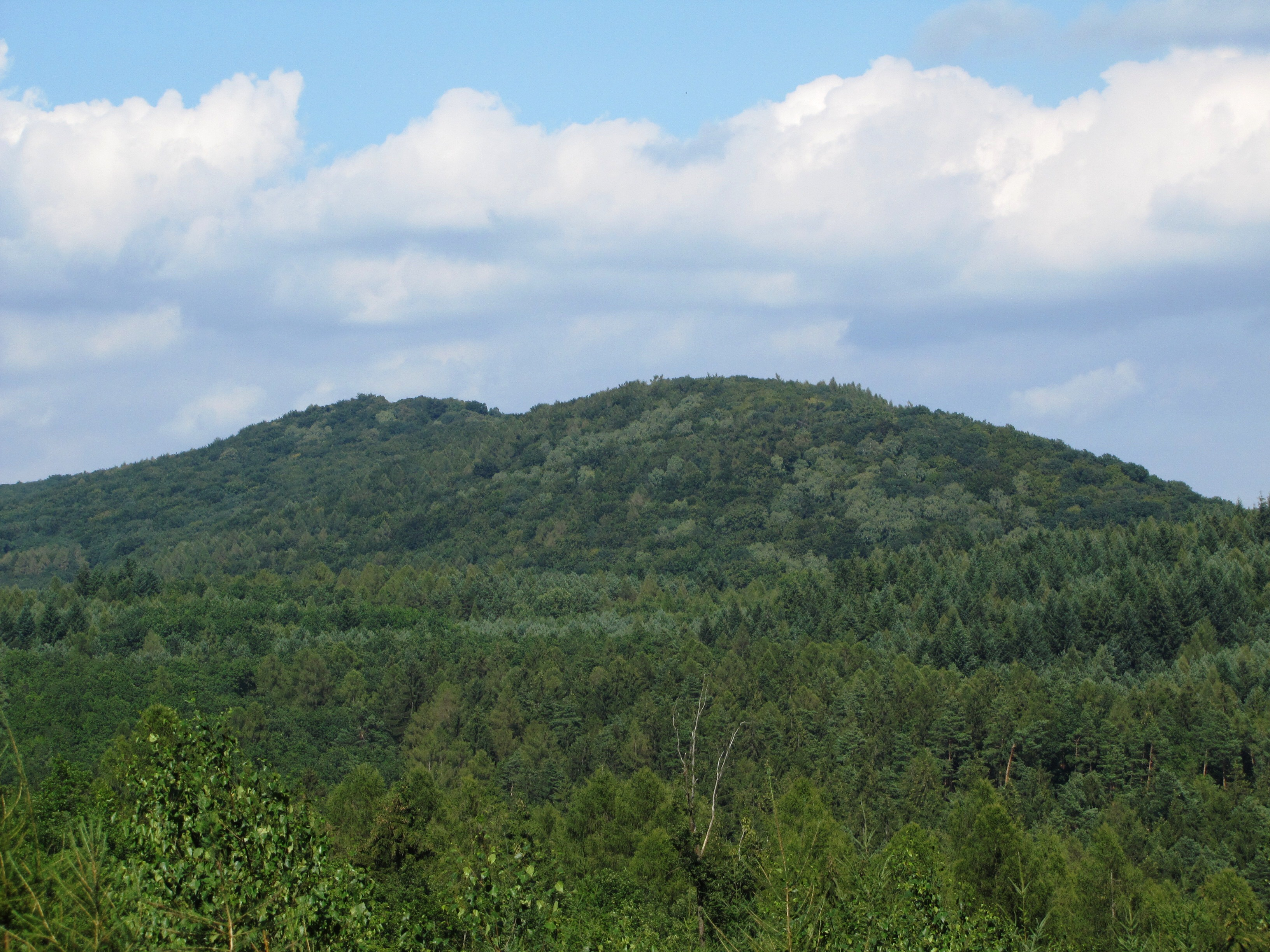 Kopec Bradlo v Chřibech (543 m n.m.) - pohled od západu